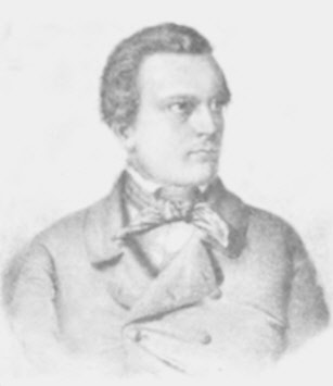 Peter Fries (12.11.1820 Grünstadt - 31.7.1851 Montpellier); Lithographie